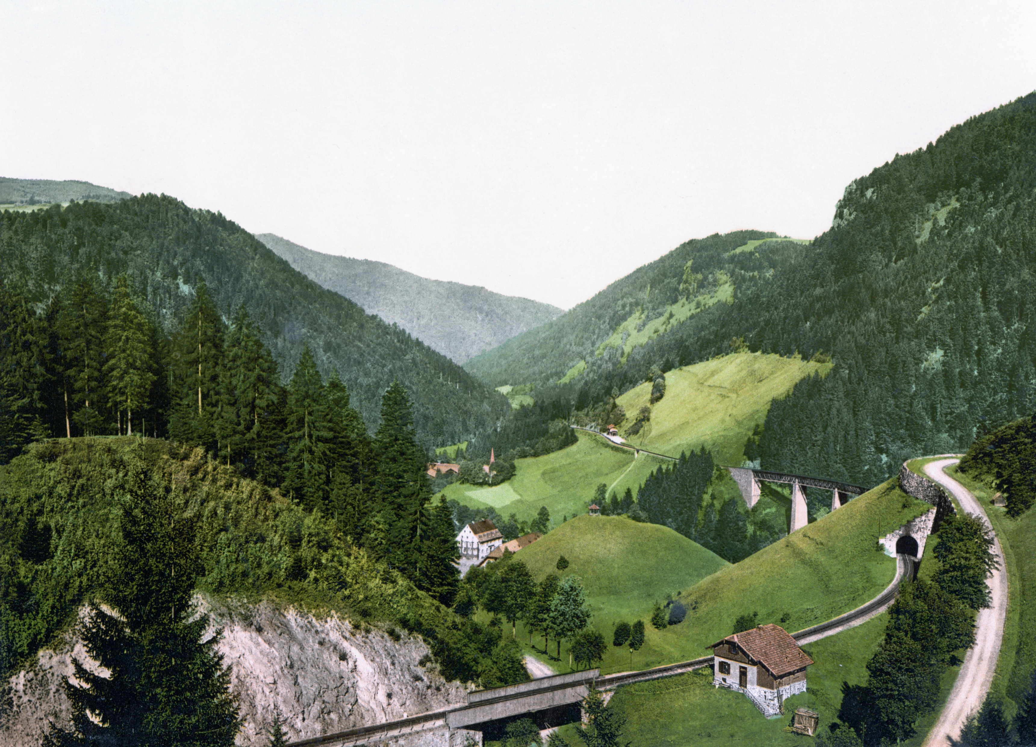 Höllental und -bahn um 1900